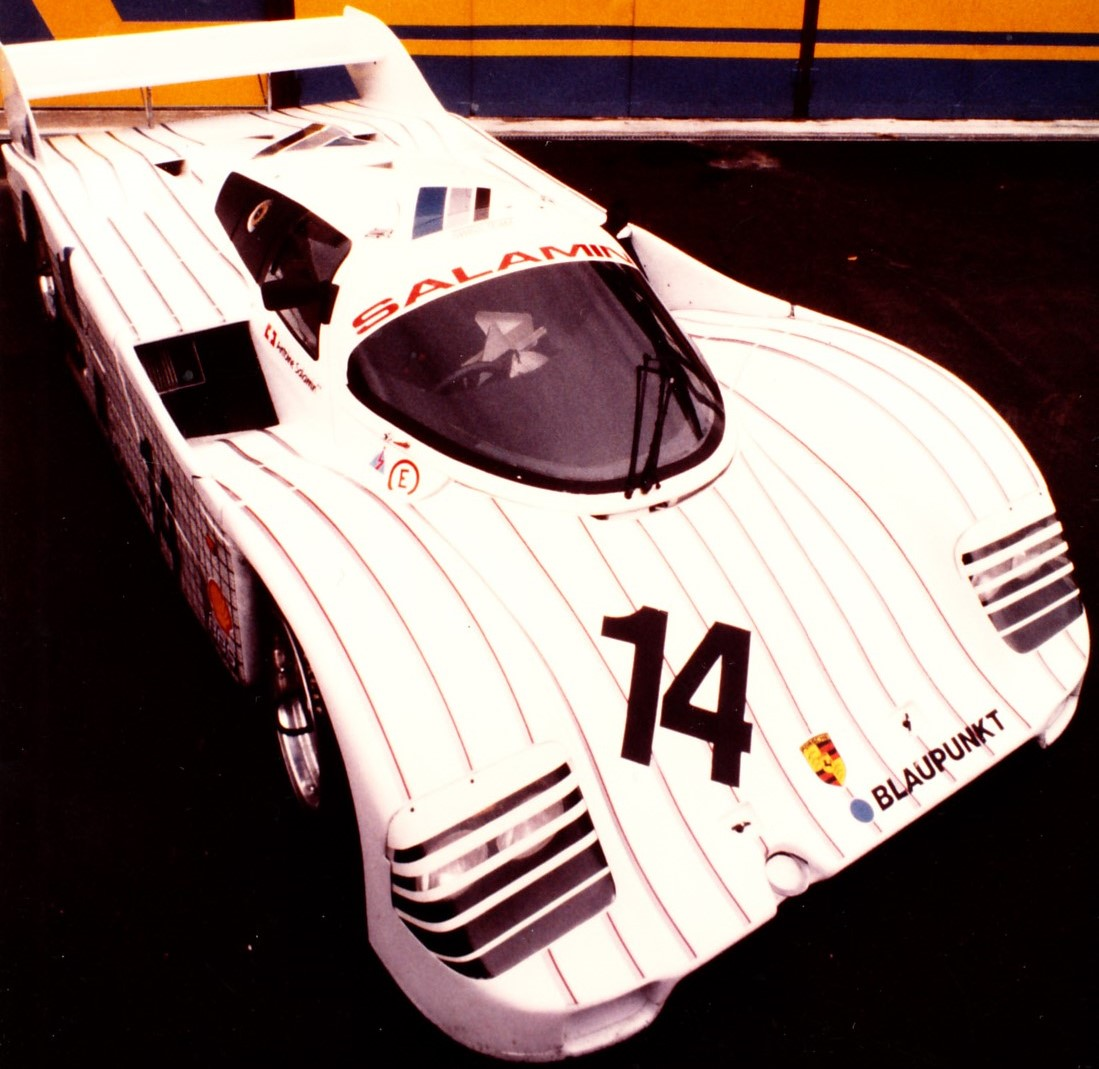 Présentation de la Porsche 962C du Swiss Team Salamin en 1987 devant l'atelier de compétition à Chalais.